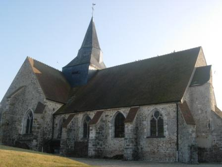 Saint-Martin-de-Bossenay église Aube France